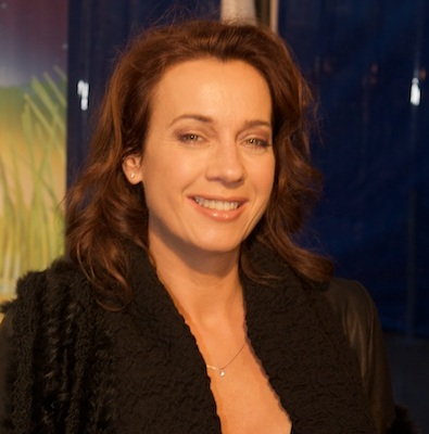 Presentatrice, musicalactrice en zangeres Marjolein Keuning